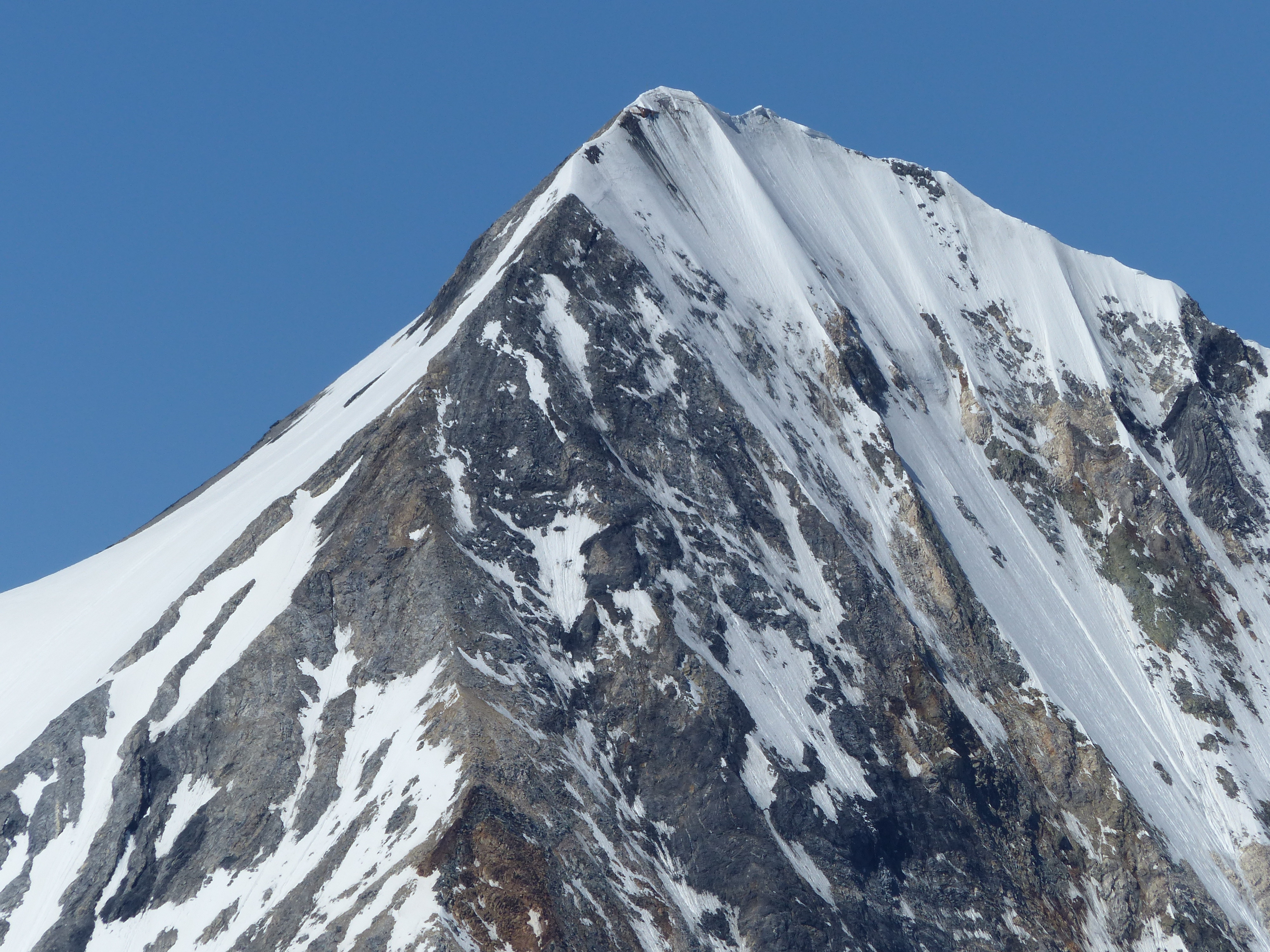 Gipfelregion der Königspitze (Blick von der Hinteren Schöntaufspitze)